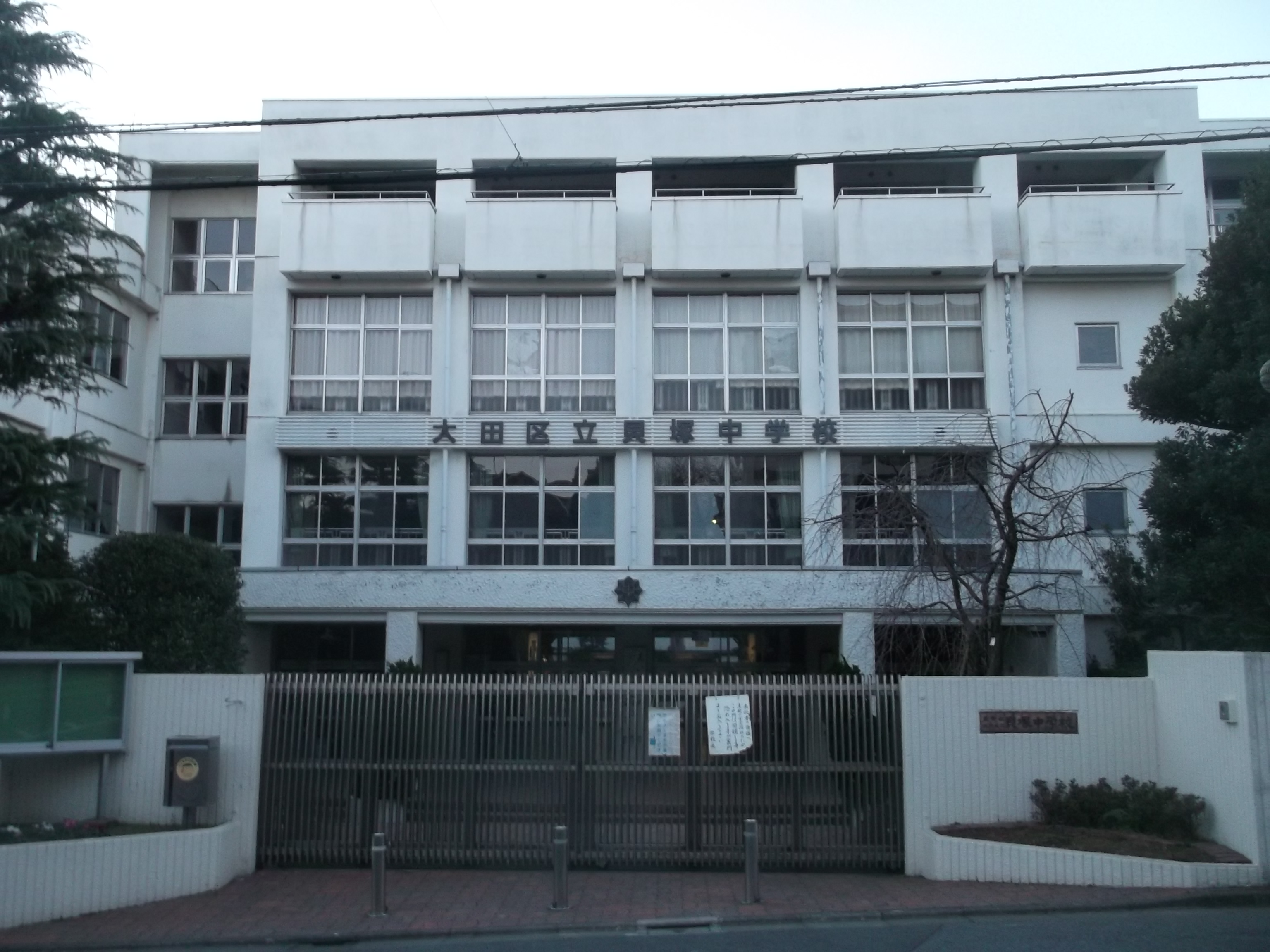 大田区立貝塚中学校